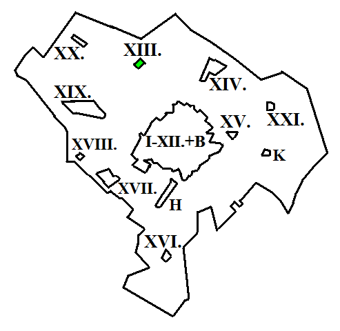 Kecskemét XIII. kerülete a térképen (Talfája)